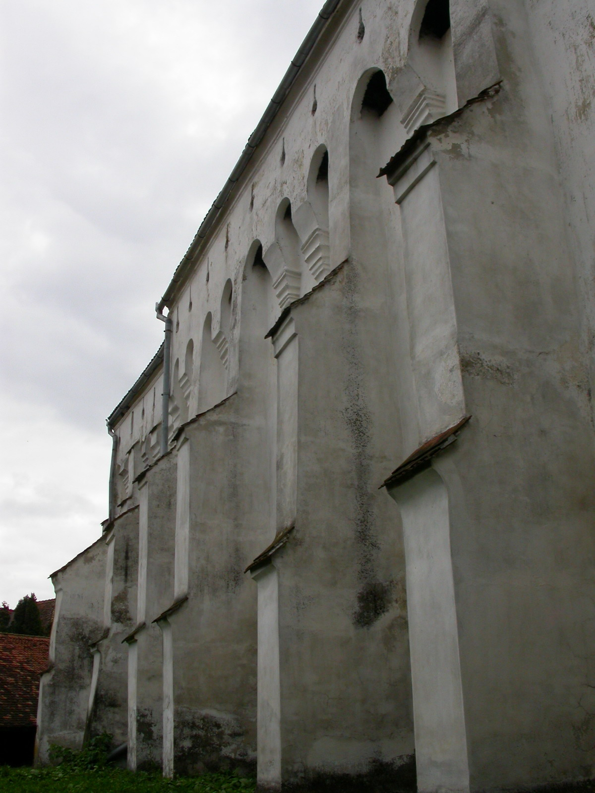 Biserica unitariană din Darjiu, sec. XV - XVIII 01